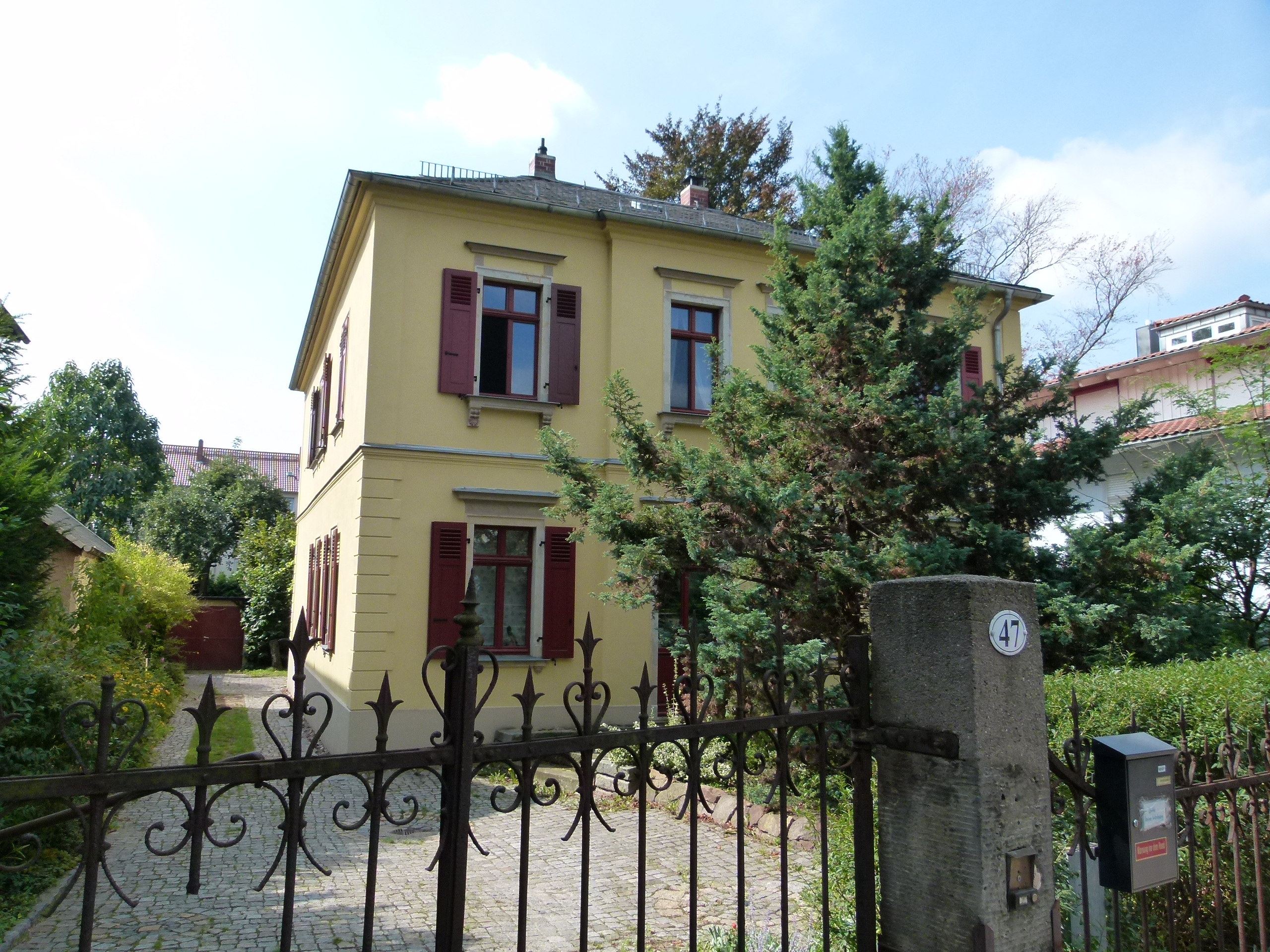 Denkmalgeschütztes Haus, Heinrich-Zille-Straße 47, Radebeul, Sachsen